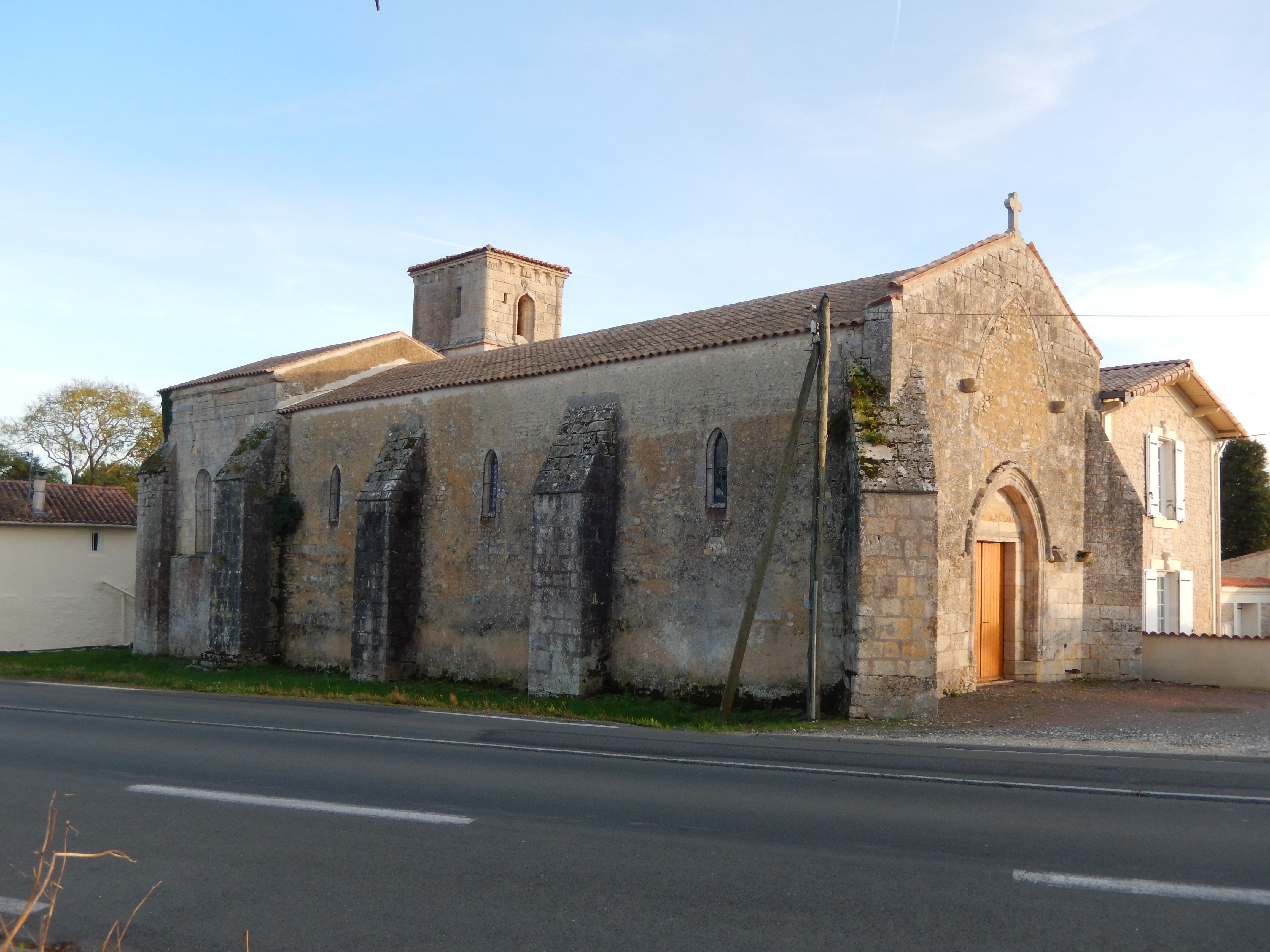 Puy-du-Lac, Charente-Maritime, France. L'église Notre-Dame de l'Assomption de Puy-du-Lac (parfois considérée comme un oratoire ou une chapelle) est située au hameau de la Ragoterie, au bord de la route départementale 739.